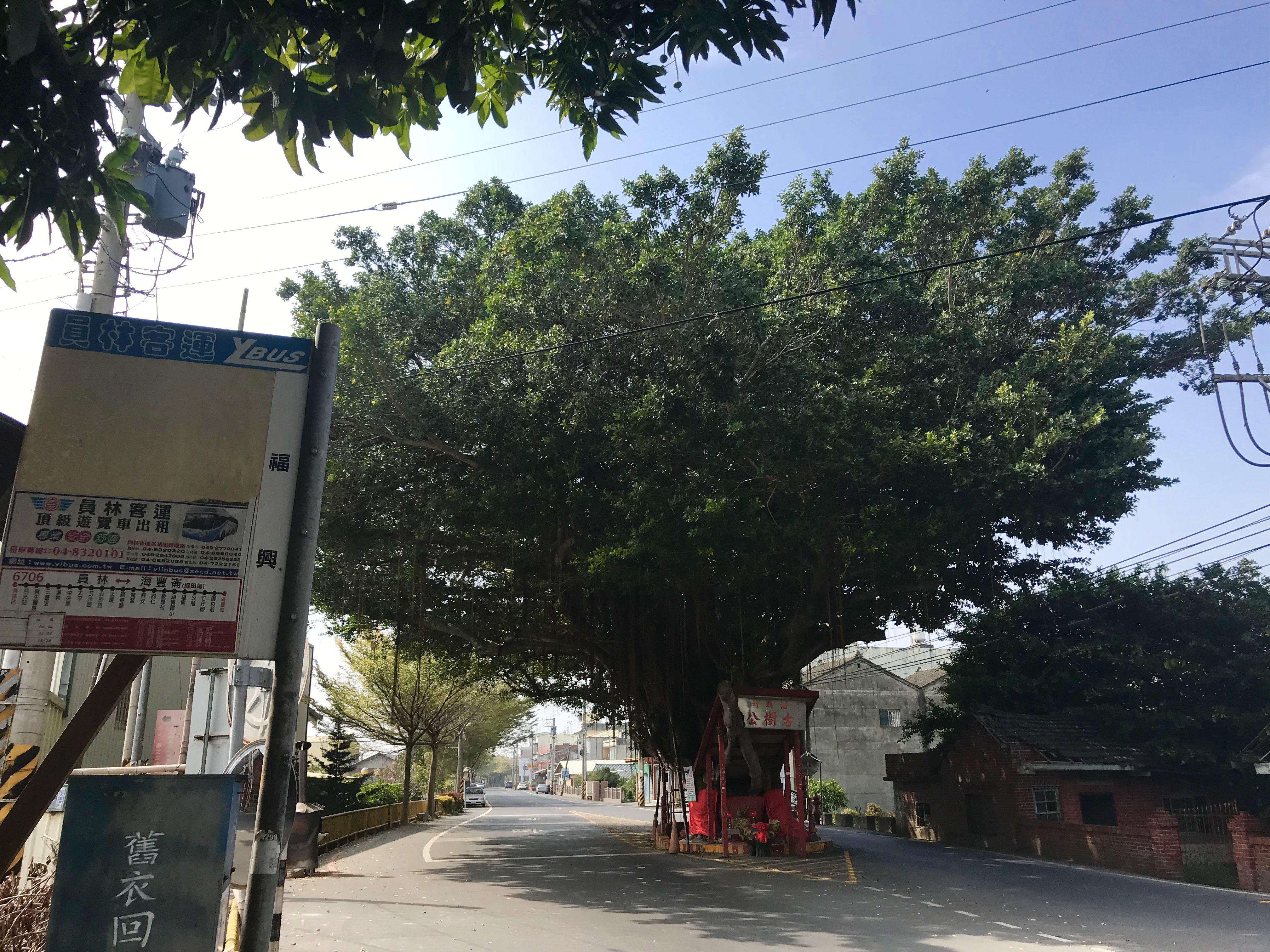 中文（台灣）: 永靖古樹公與員林客運「福興」站牌。